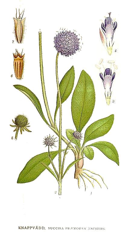 Succisa pratensis Moench, syn. Succisa praemorsa Asch. Original Description Knappvädd, Succisa praemorsa Aschers.